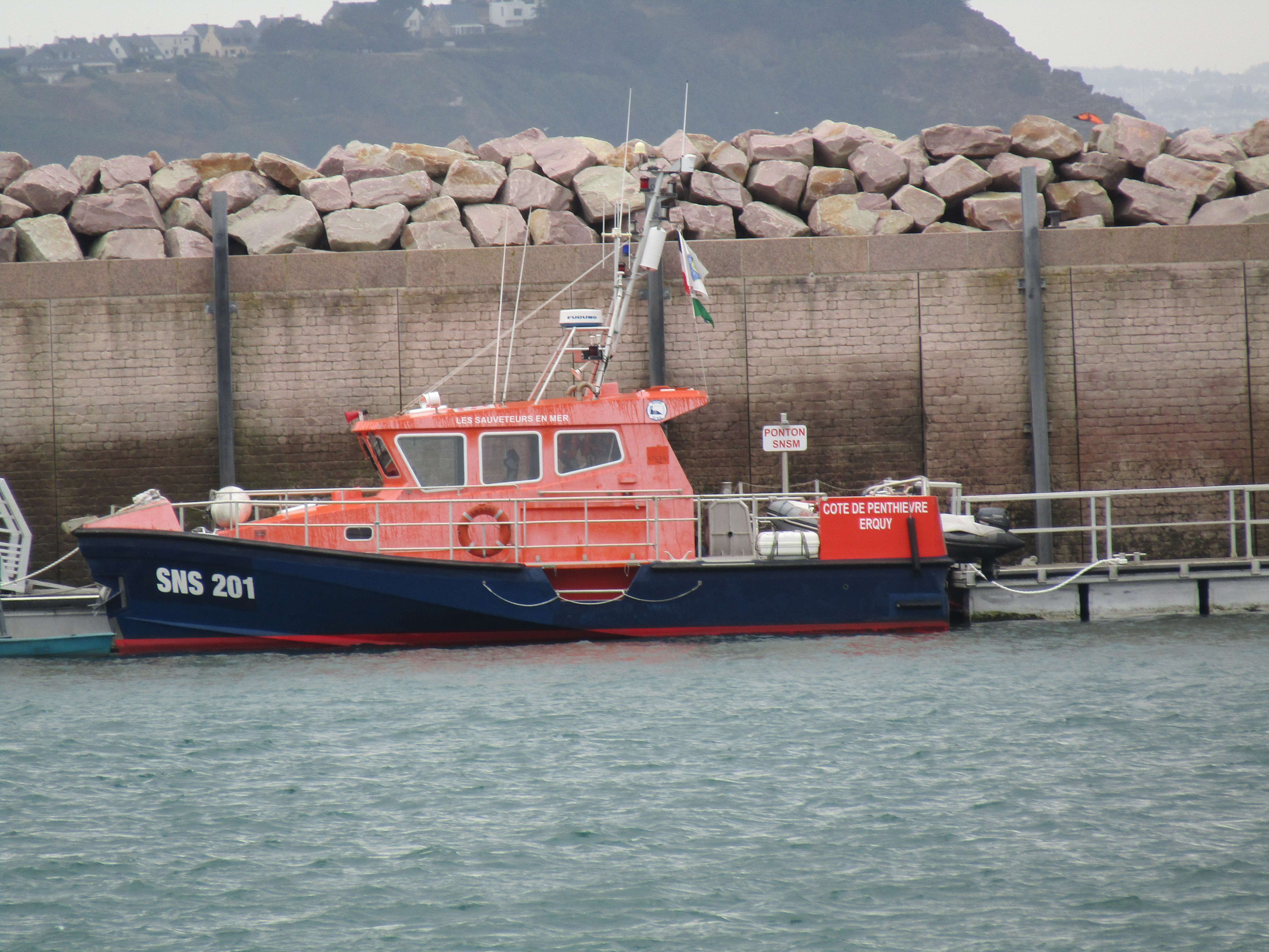 SNS 201 dans le port d'Erquy